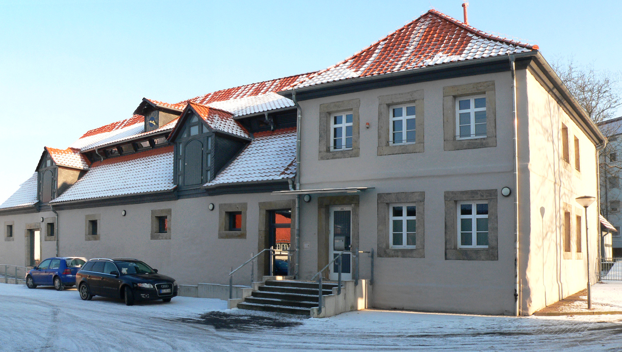 Burg Gebhardshagen, Sitz Förderverein auf früherem Domänengelände